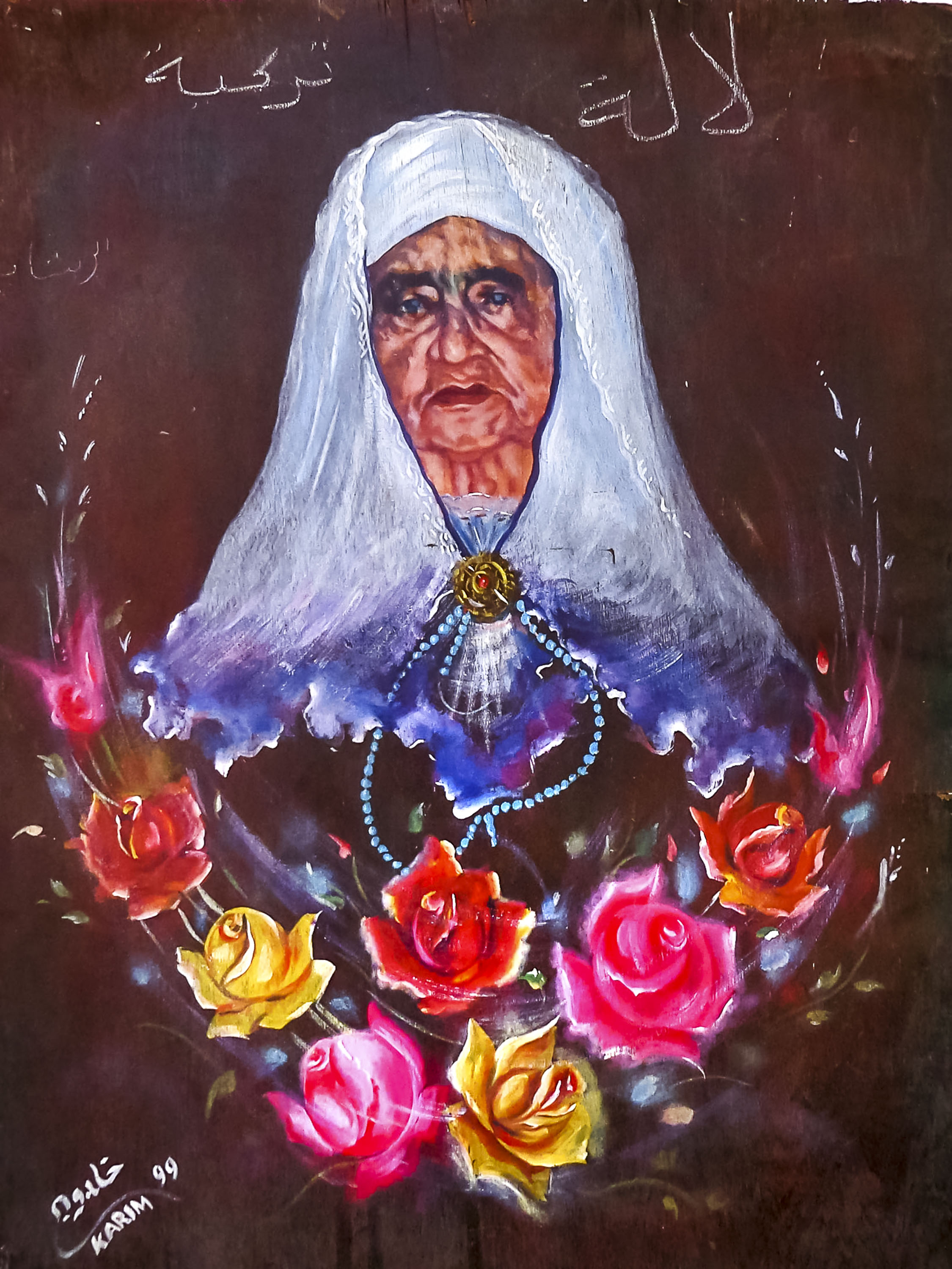 Zaouia de Lella Torkia, Rechaiga - wilaya de Tiaret زاوية لالة تركية بلدية الرشايقة - ولاية تيارت